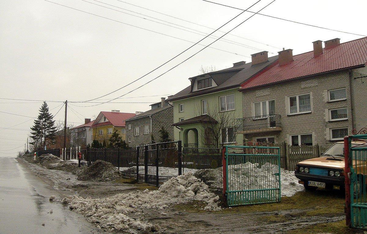 Zabudowa podkrakowskich wsi jest jednakowa, wsie ciągną się kilometrami, jedna się kończy, a zaczyna następna. Pierwotnie były tu drewniane domy, ale po wojnie ustąpiły trwalszej, ale chaotycznej zabudowie.